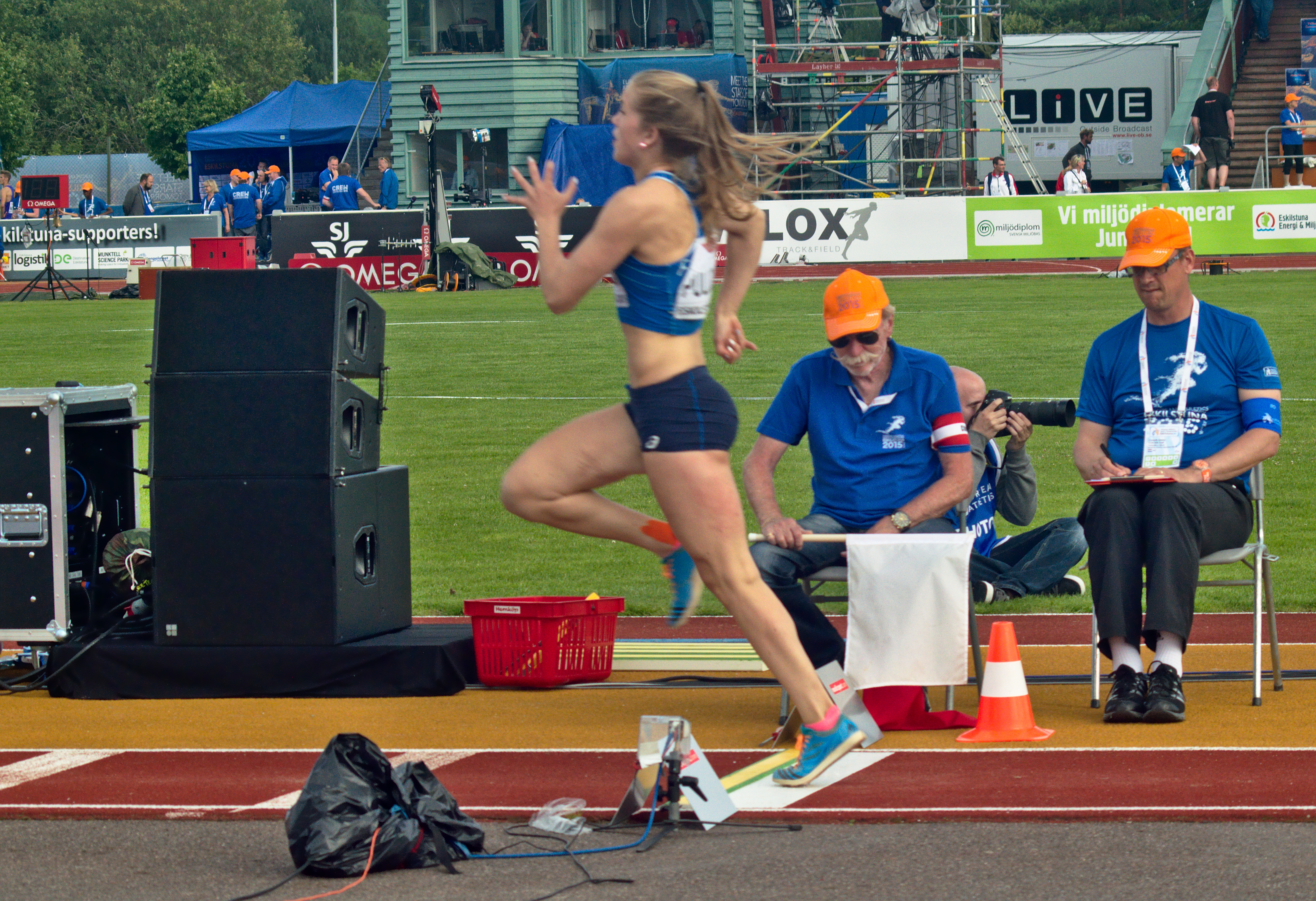 Funktionärer kontrollerar avstampet på plankan när Emma Pullola hoppar tresteg vid Junioreuropamästerskapen i friidrott 2015